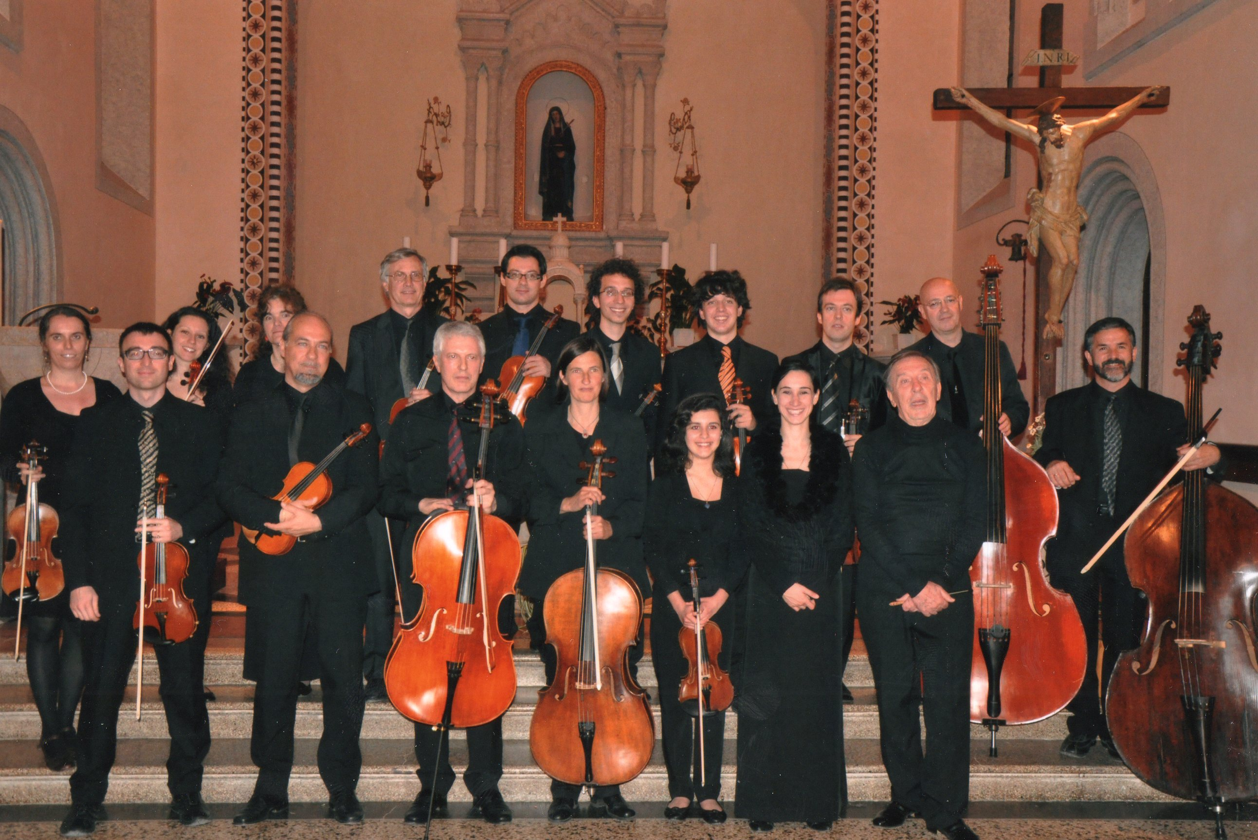 Orchestra d'archi, Rovereto.